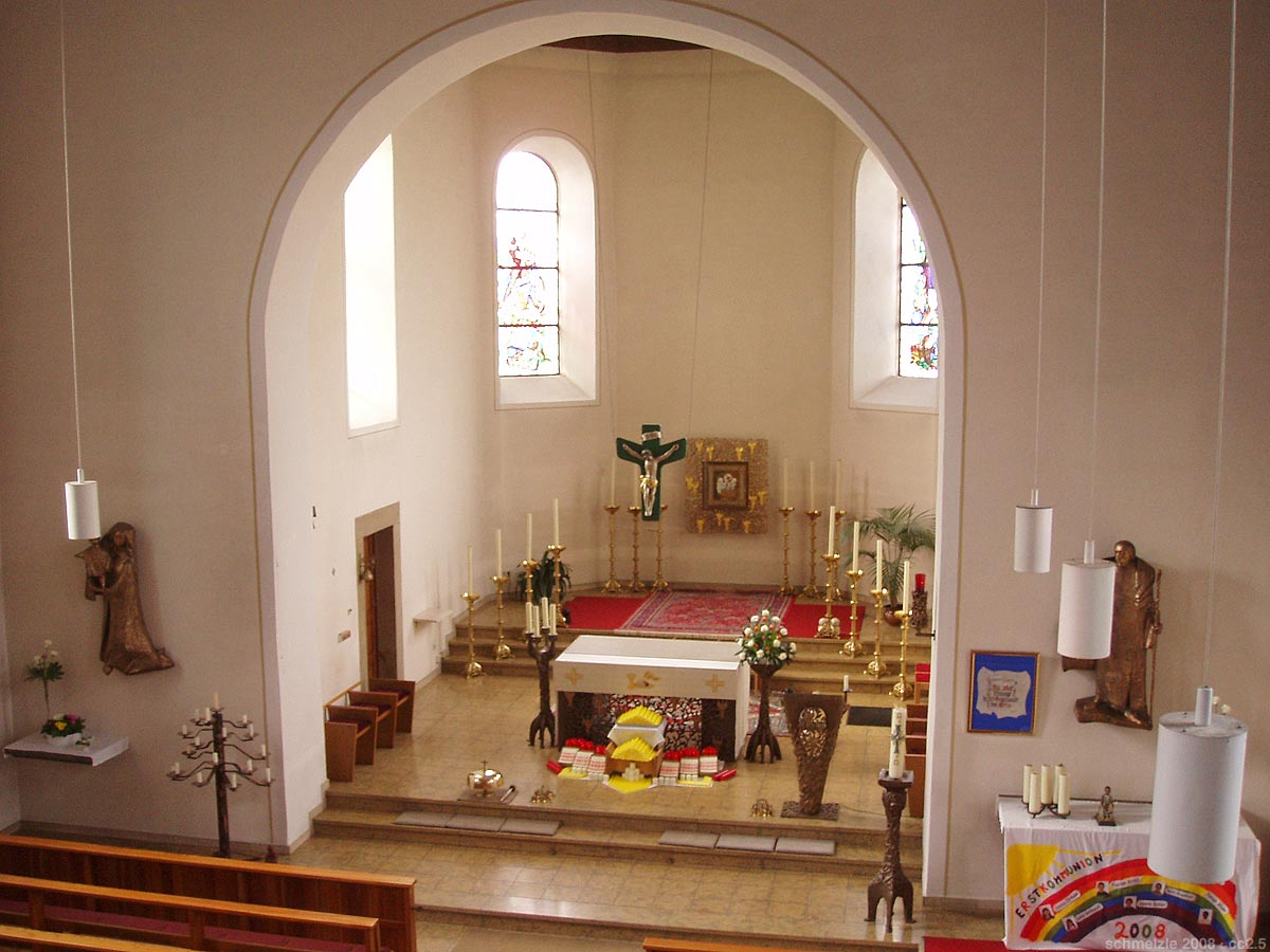 Katholische Kirche St. Georg in Siegelsbach, Blick zum Chor